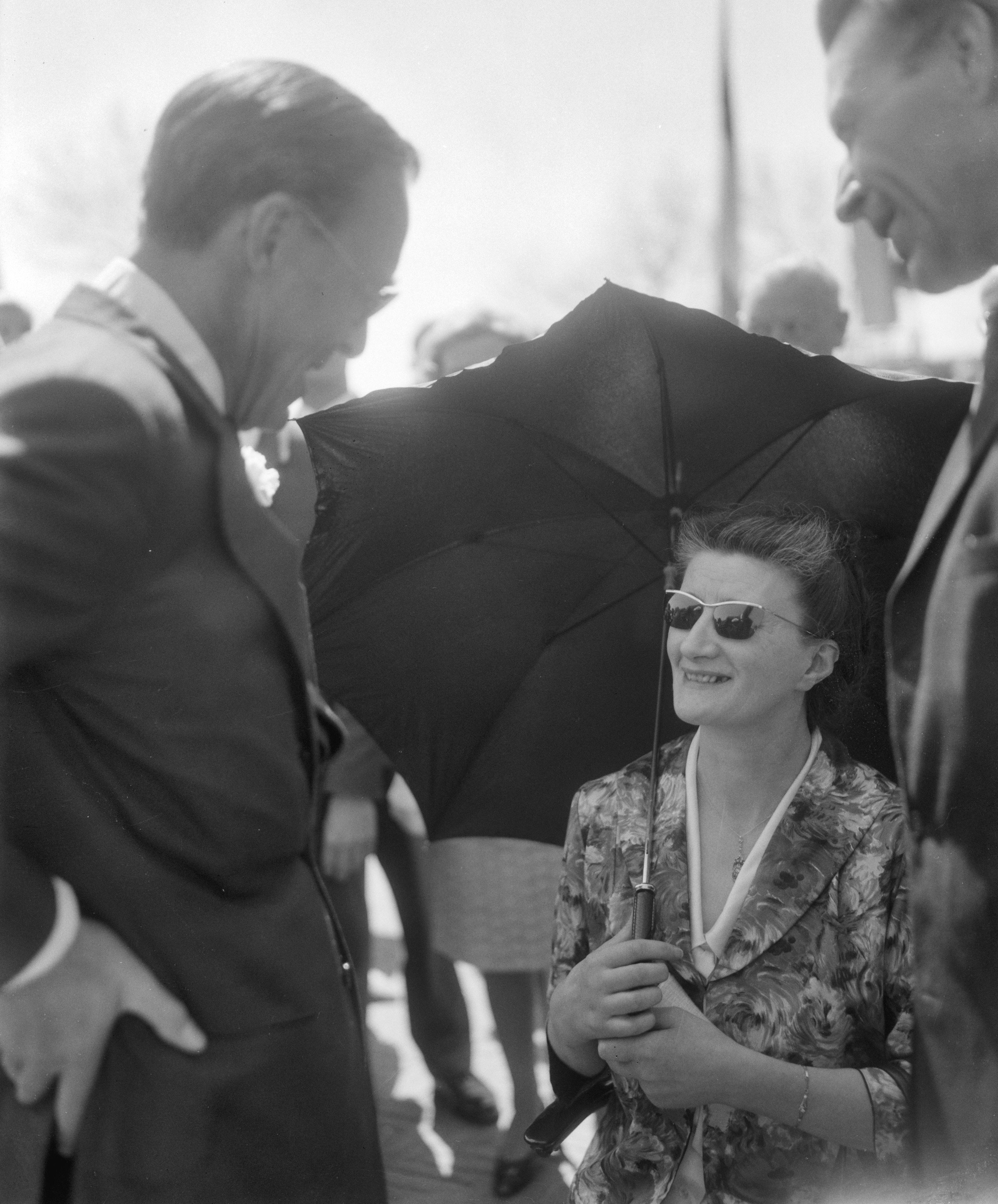 Onthulling herdenkingsmonument Crossline te Sliedrecht, prins Bernhard en koerierster Riet van Haterd-Van Grunsven